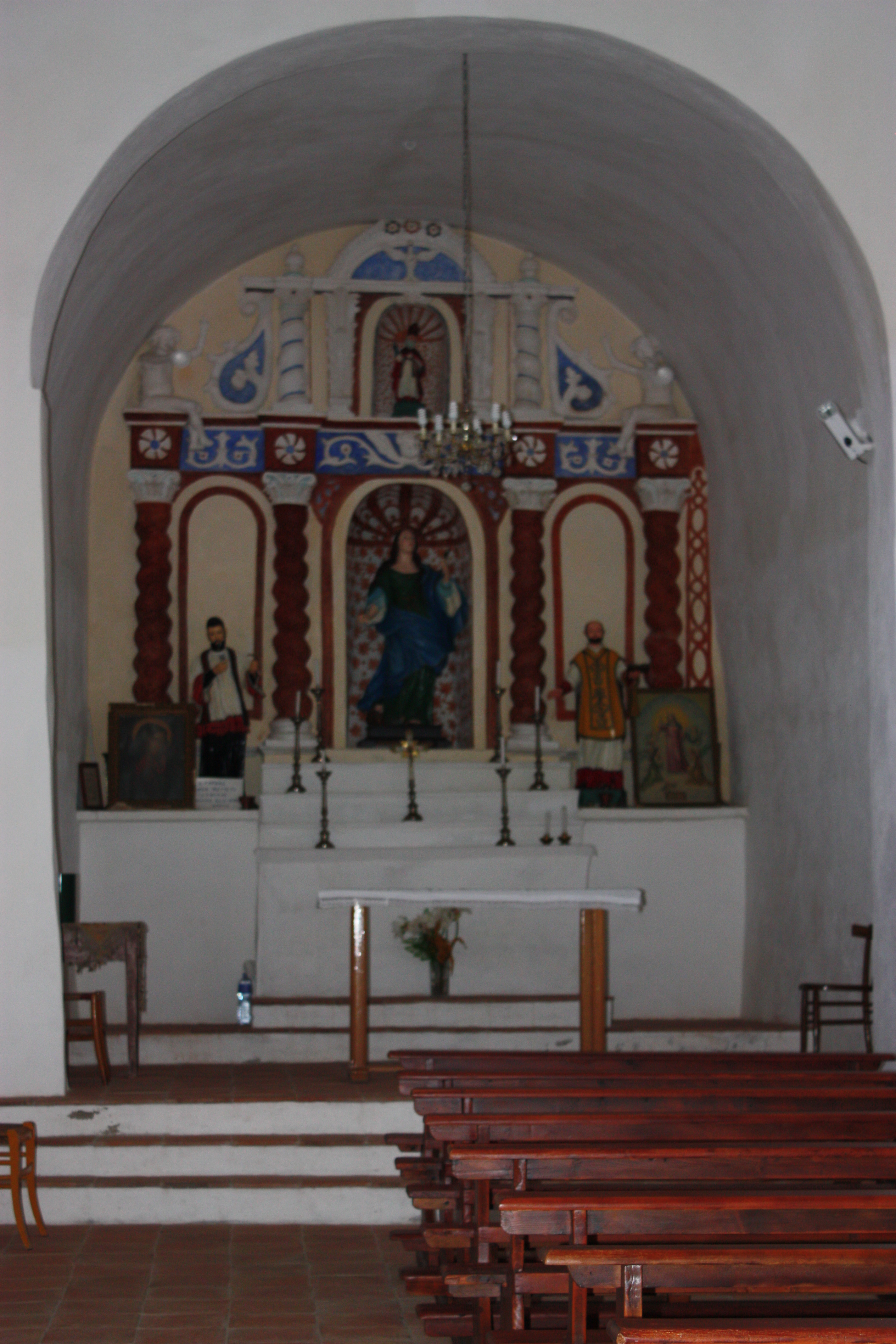 Girifai: Chiesa di San Lucifero Vescovo e di Santa Maria Maddalena (XI secolo) ampliata nel XVII secolo a Dorgali (già di Thorpeia).